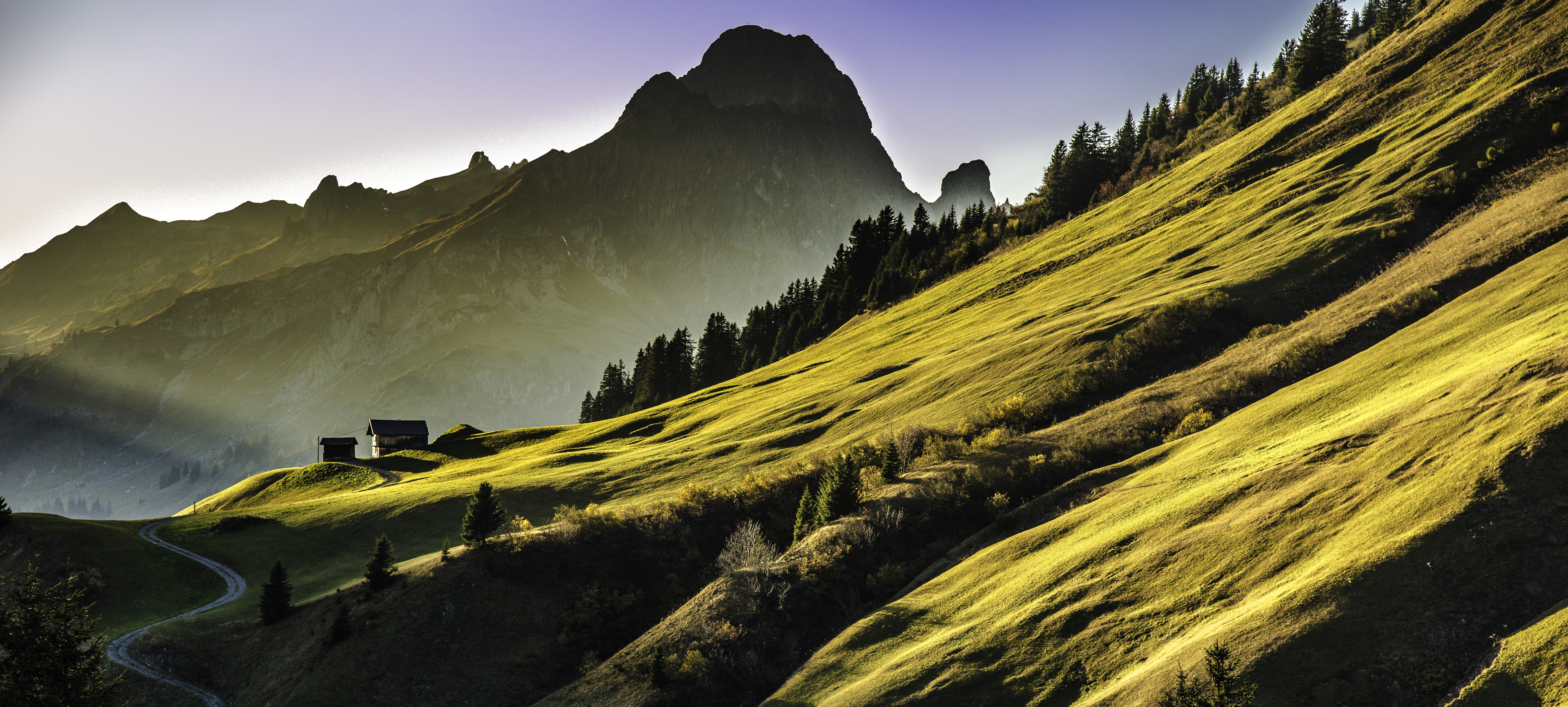 Landscape of Austria